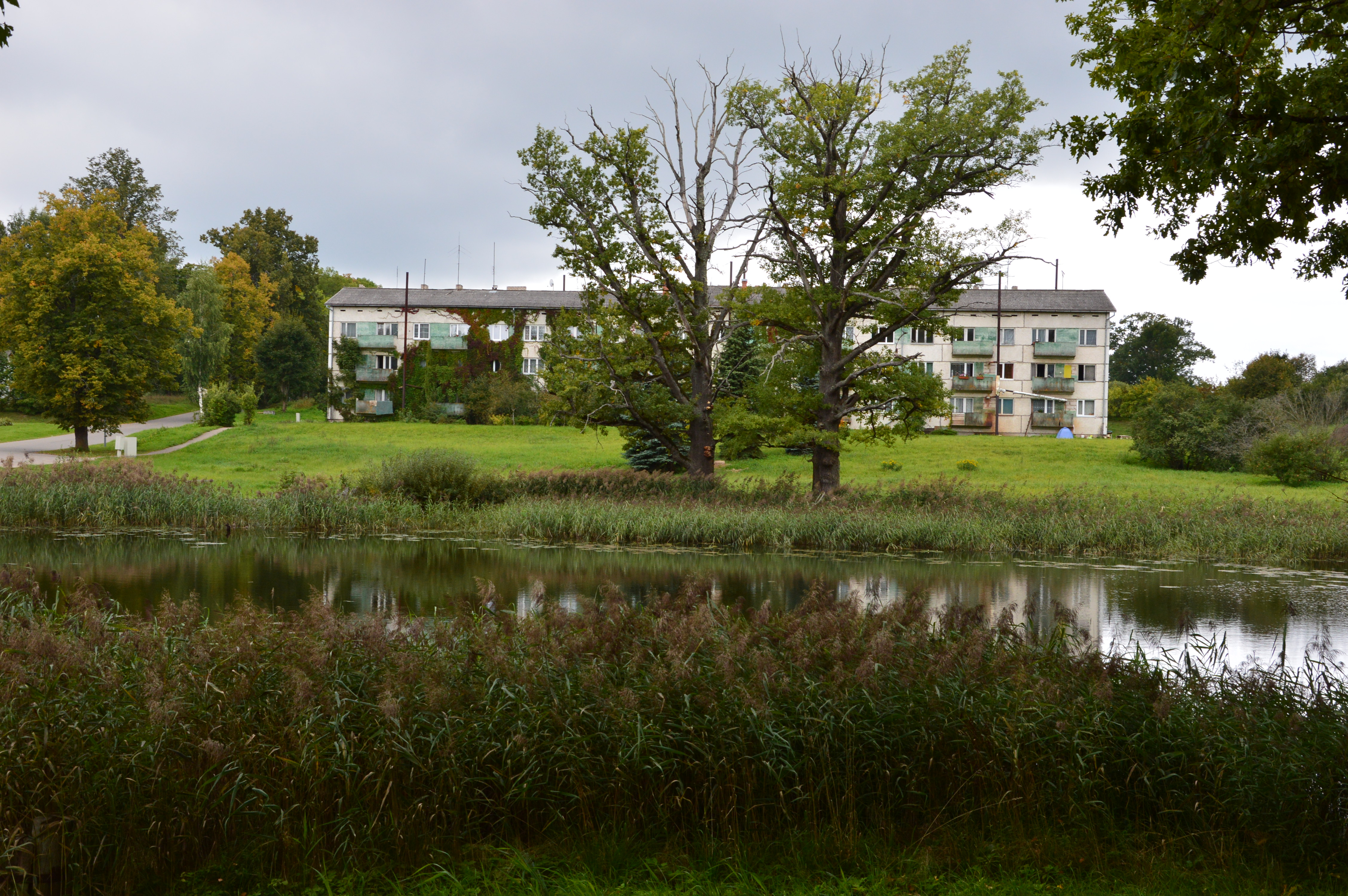 Litene.